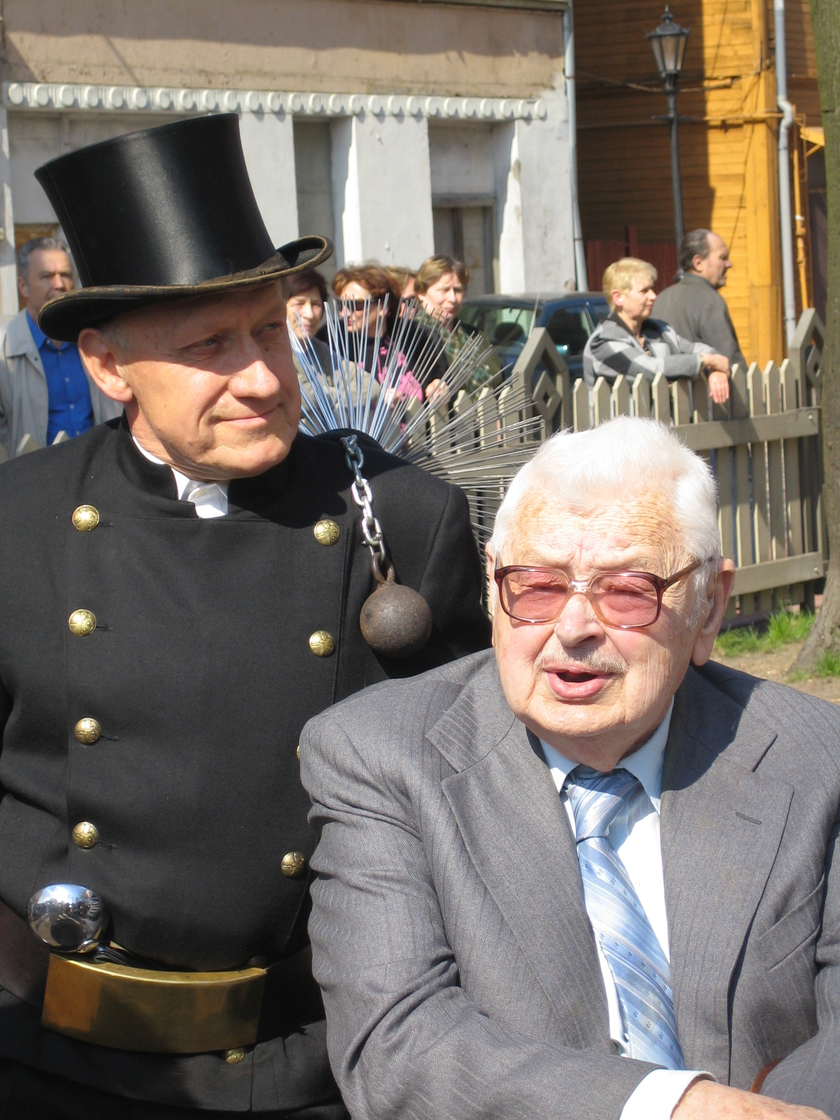 Герои памятника "Трубочист и каменщик". Варис Вилцанс и Карлис Себрис